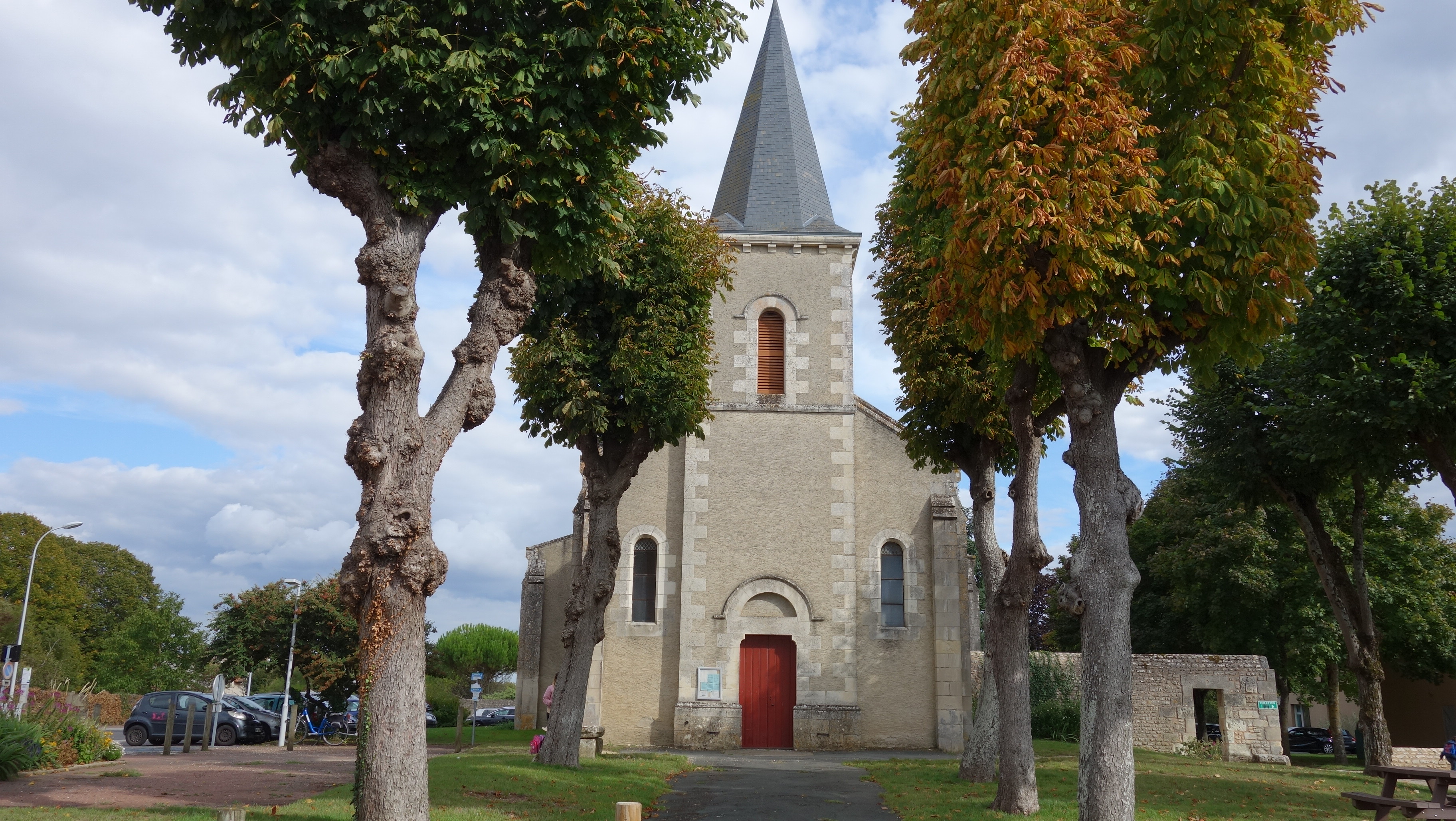 Photographie de face de l'église du bourg à Buxerolles